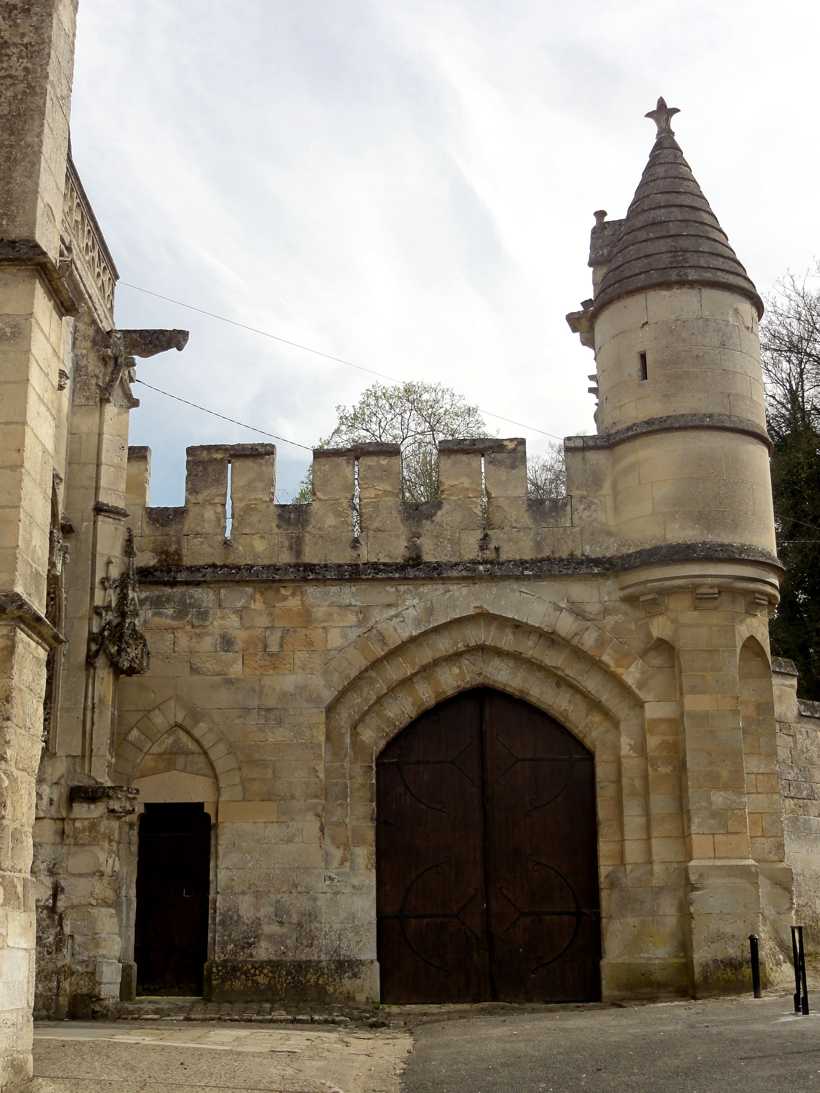 Porte fortifiée à côté de la façade occidentale.